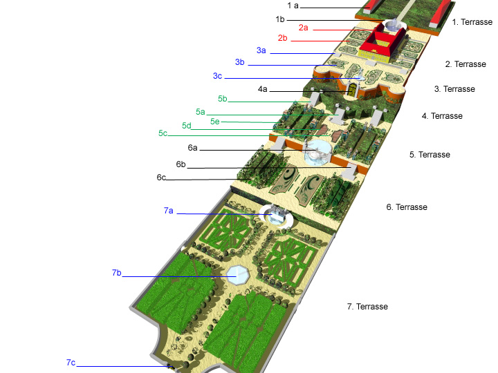 Der Garten von Schloss Hof - Rekonstruktion